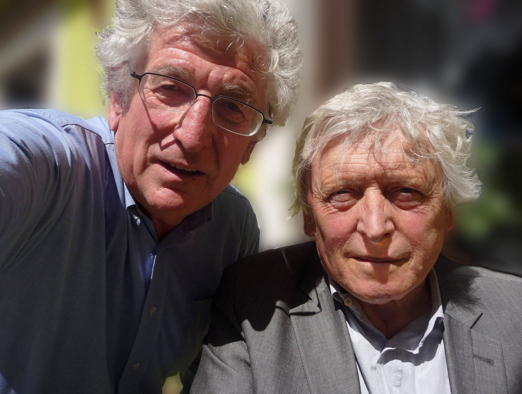 Alfred Kolleritsch (rechts) und Josef Wilhelm; die schriftliche Genehmigung der beiden portraitierten Personen zur Veröffentlichung des Bildes liegt dem Autor vor.